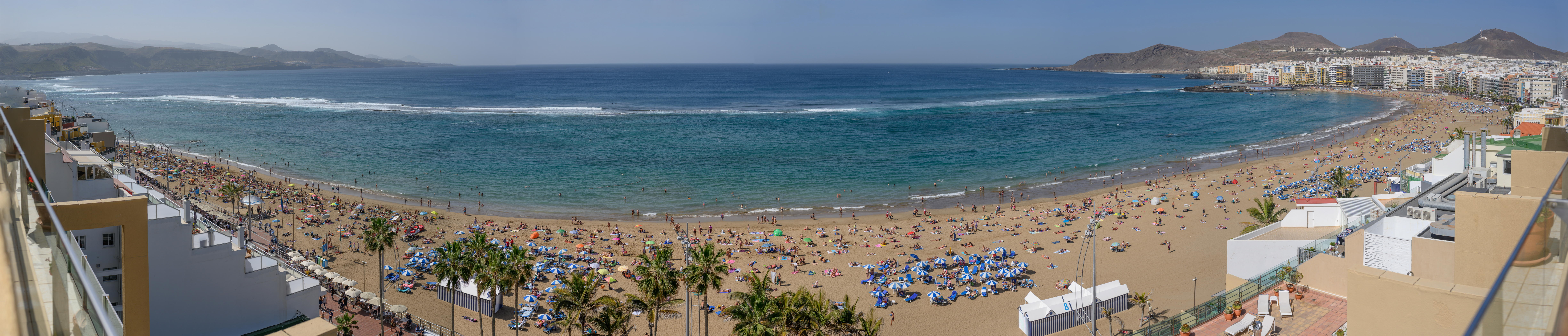 Playa de Las Canteras, Las Palmas, Gran Canaria, February 2019